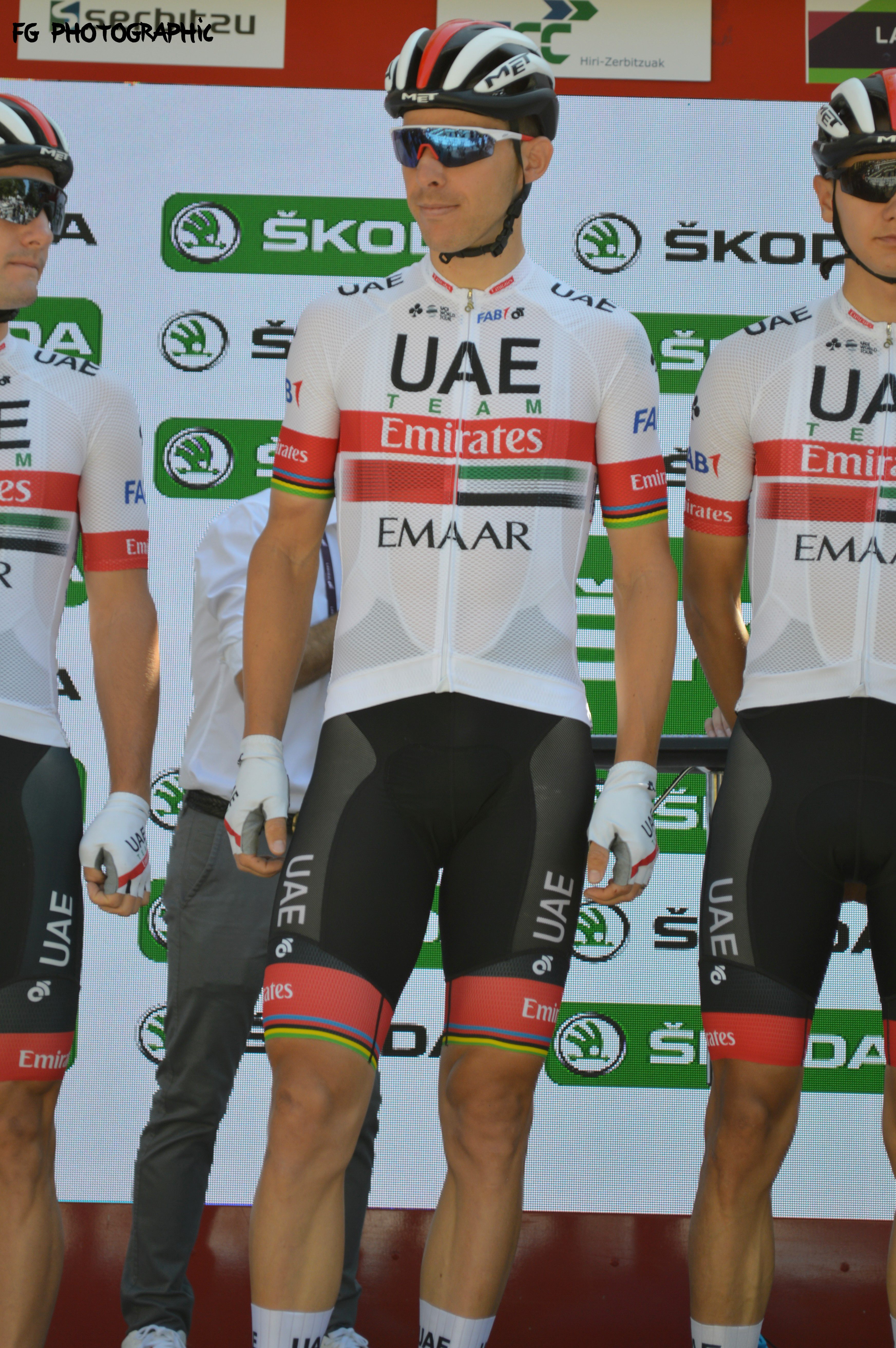 Rui COSTA - Août 2019 (Clasica San Sebastian)